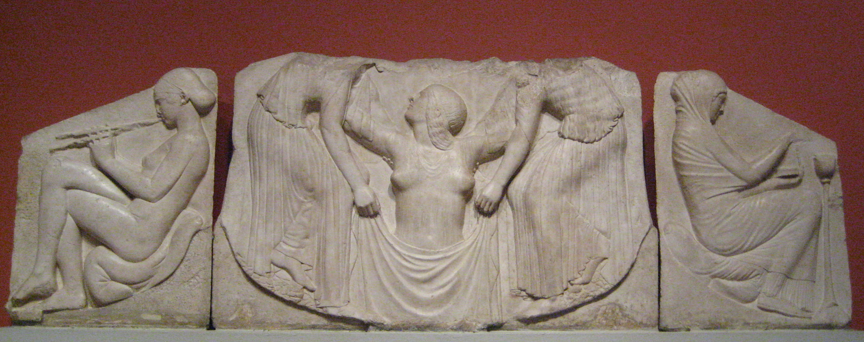 Ludovisi Throne